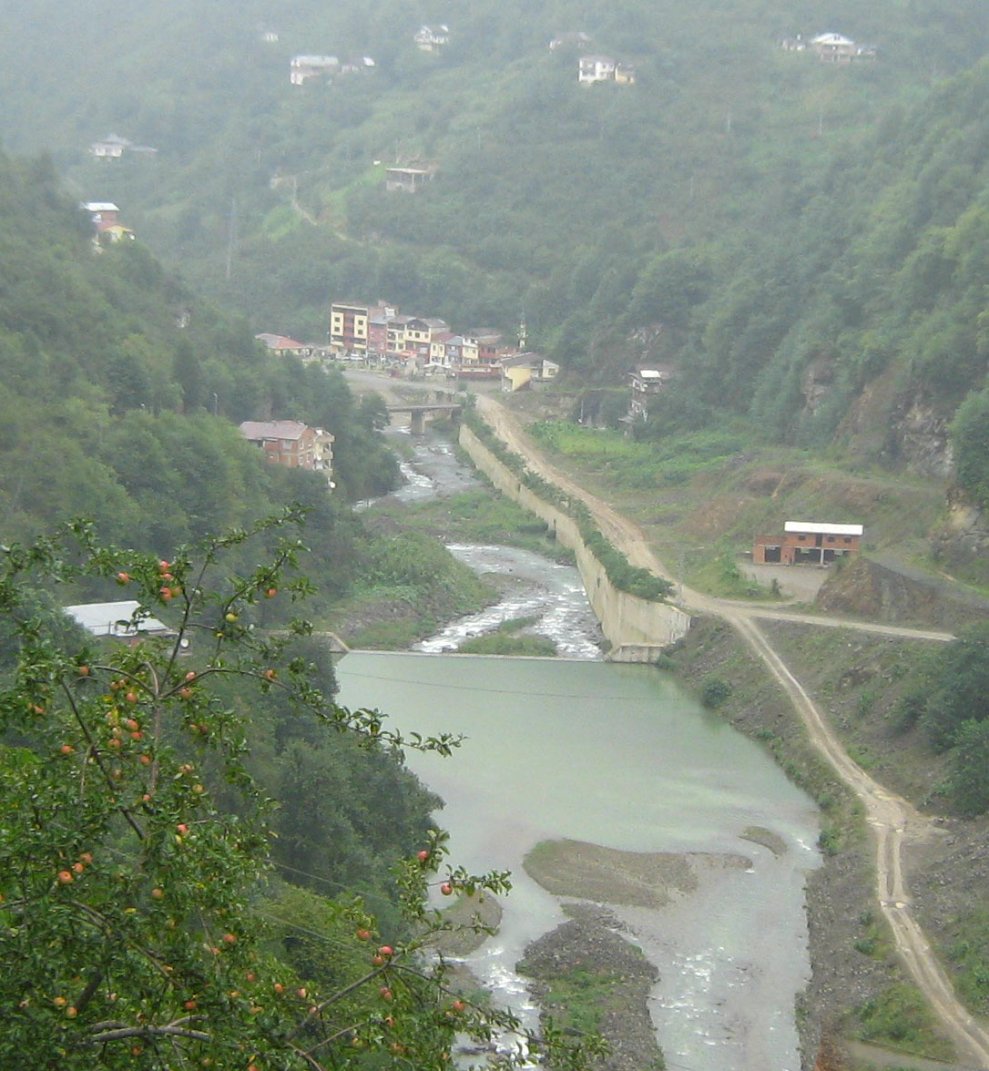 Beşköy,Köprübaşı,Trabzon belde merkezinin resmi